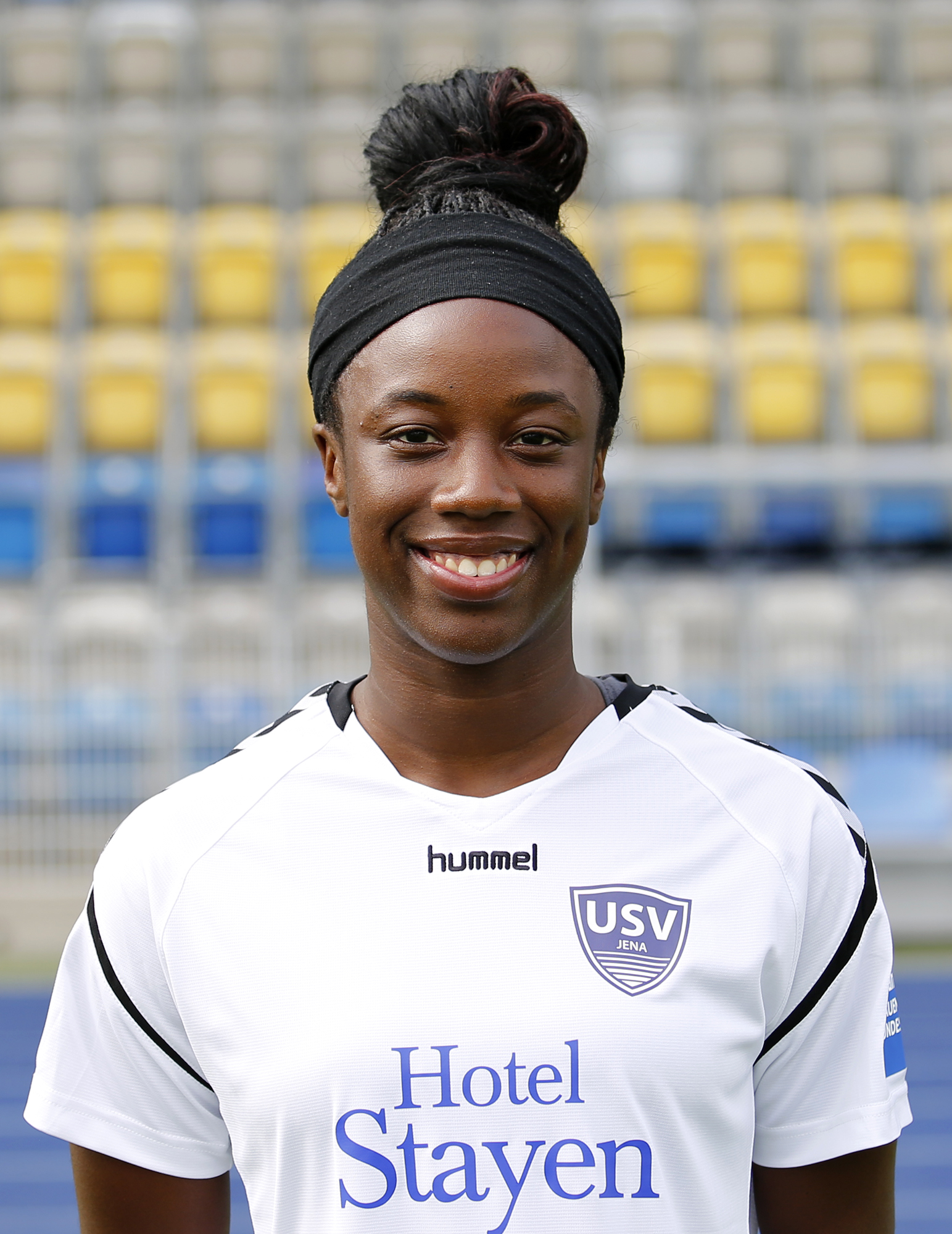 Tiffany Devona Cameron